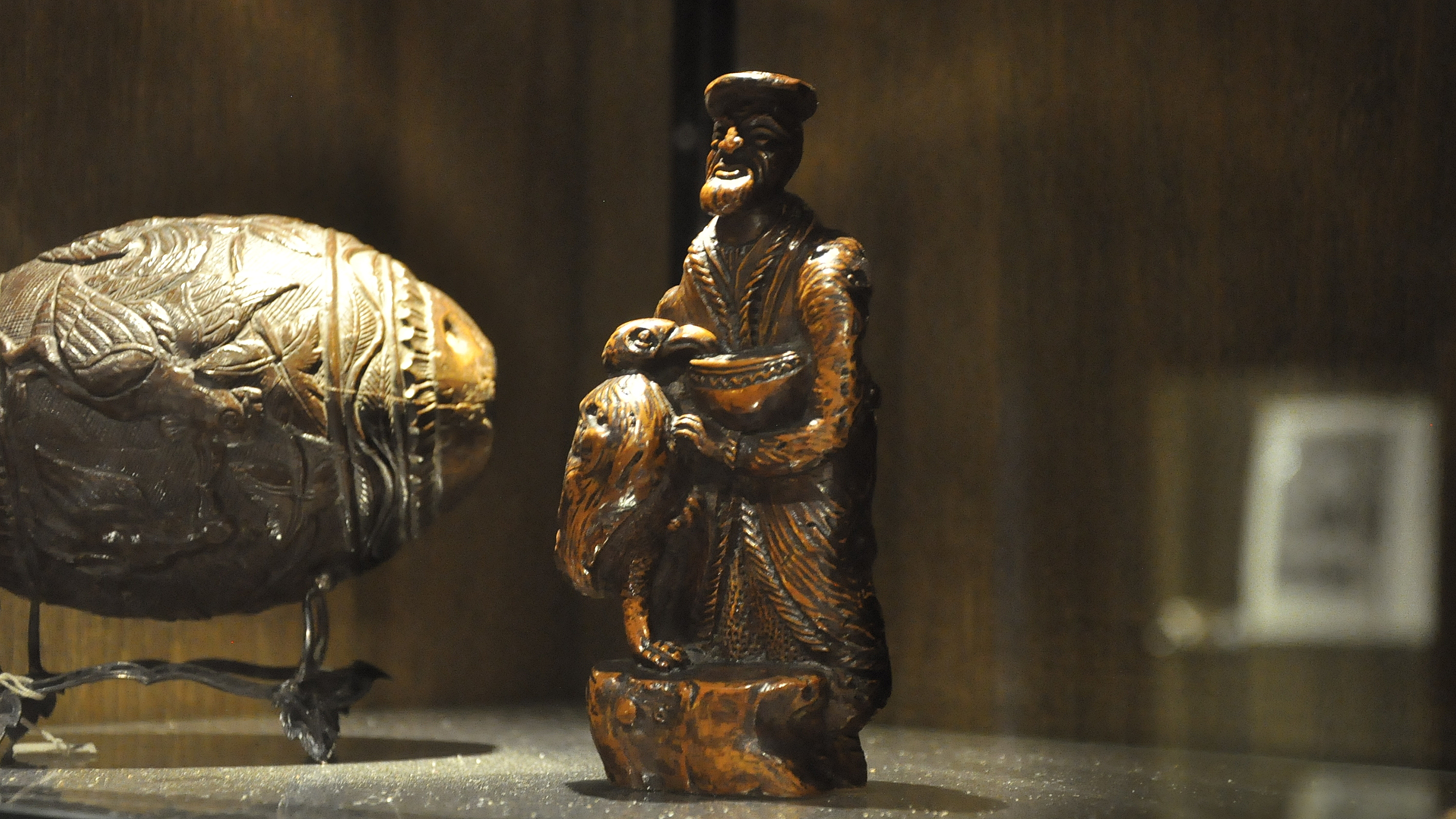 (1550-1700) Portugees (?) zeeman die dodo voedert - Hoorn - Westfries Museum 15-08-2015